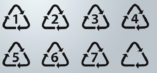 ارقام تدل على طبيعة المادة البلاستيكية المصنوع منها المنتج